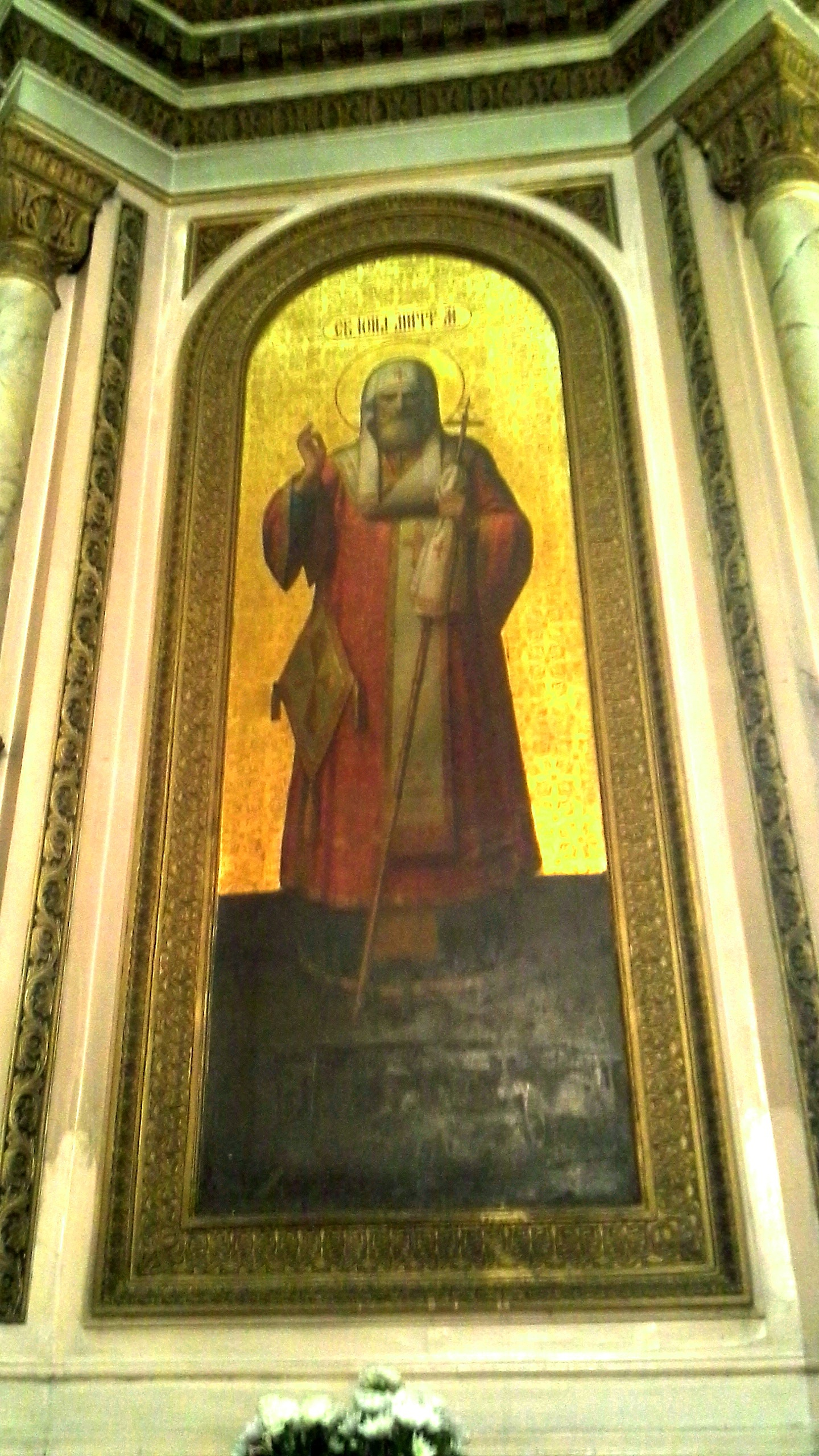 Fresk z postacią św. metropolity moskiewskiego Jonasza, sobór św. Aleksandra Newskiego w Łodzi